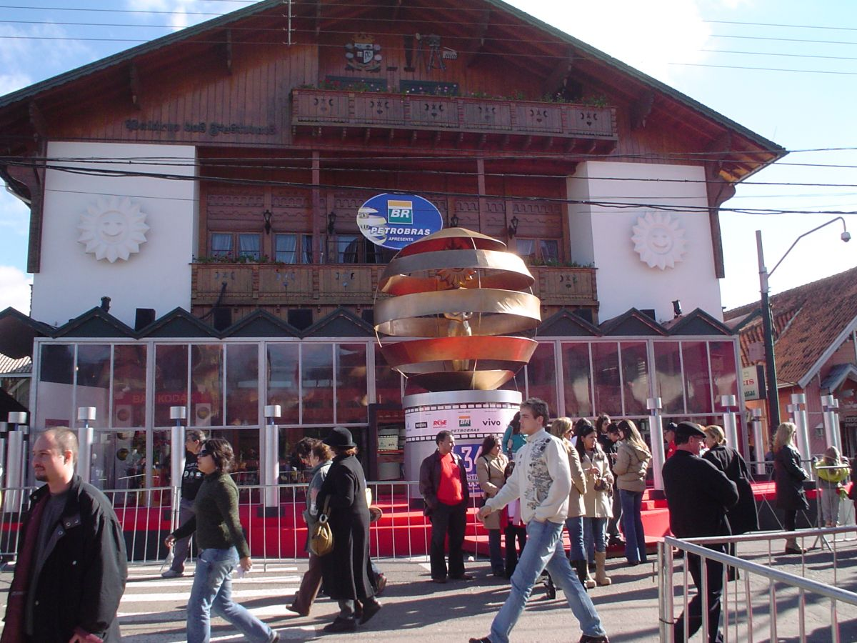 Festival de Gramado (Rio Grande do Sul - Brazil)